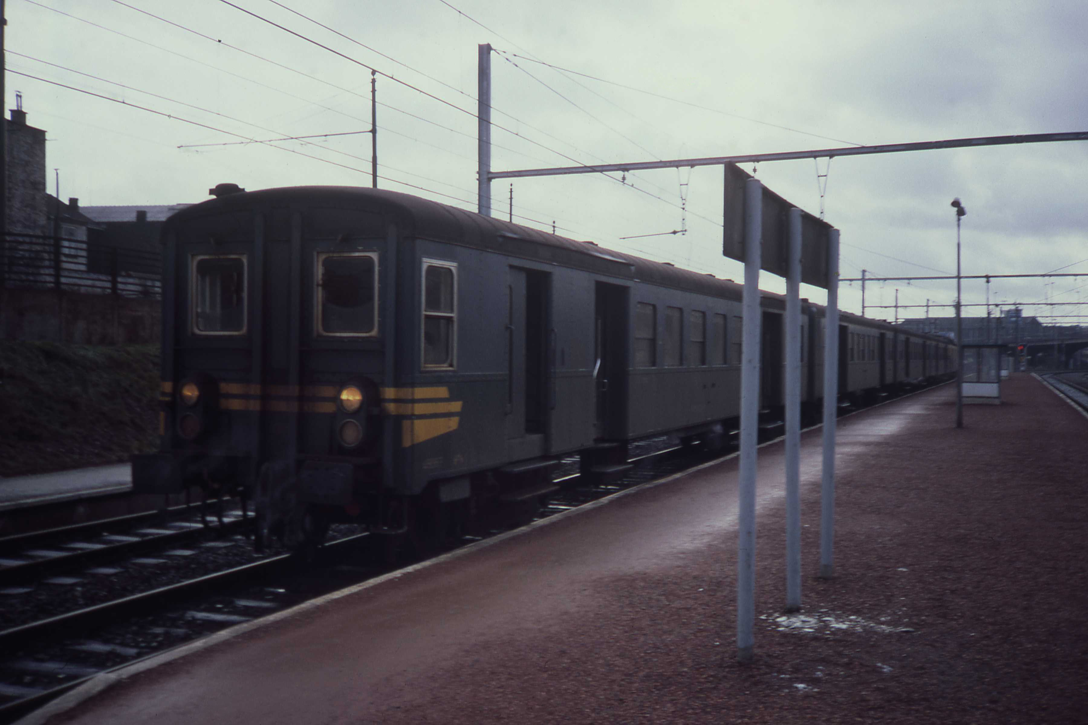 M1 rijtuigen in 1986 op een regenachtige dag in Charleroi-Ouest. De trein is klaar voor het vertrek naar Ottignies. In de zomerdienst zal elektrisch gereden worden, vandaar dat er al bovenleiding geïnstalleerd is.